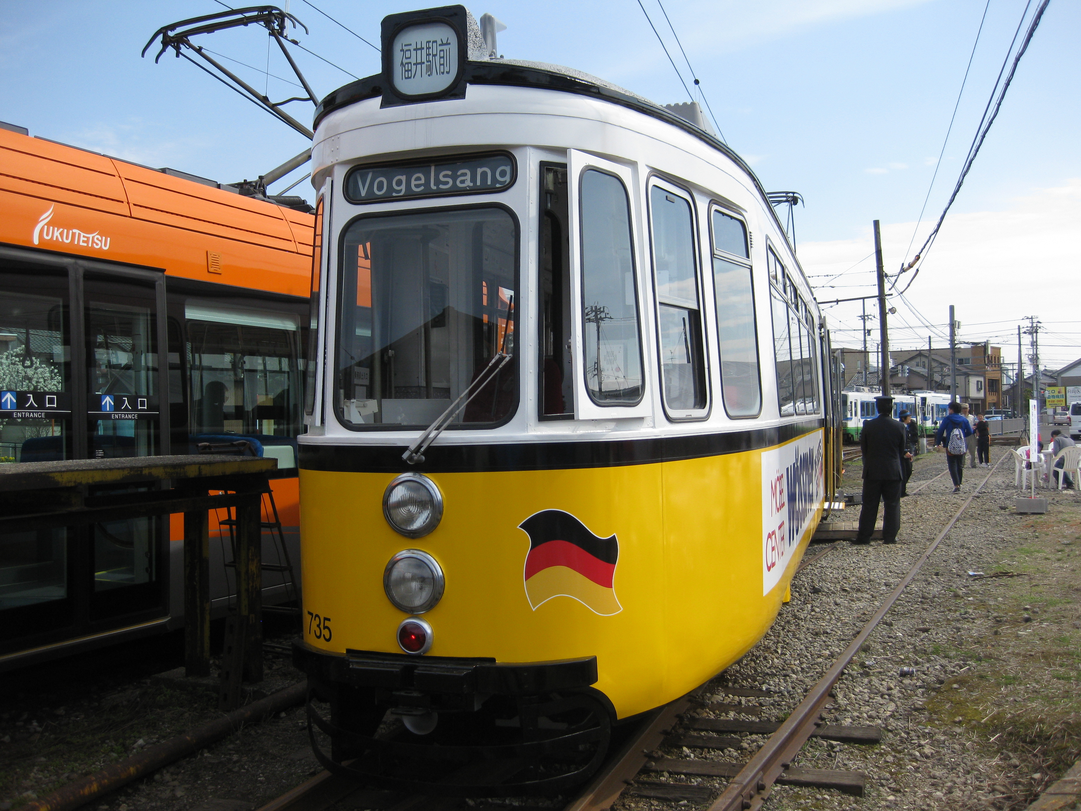 福井鉄道の735形